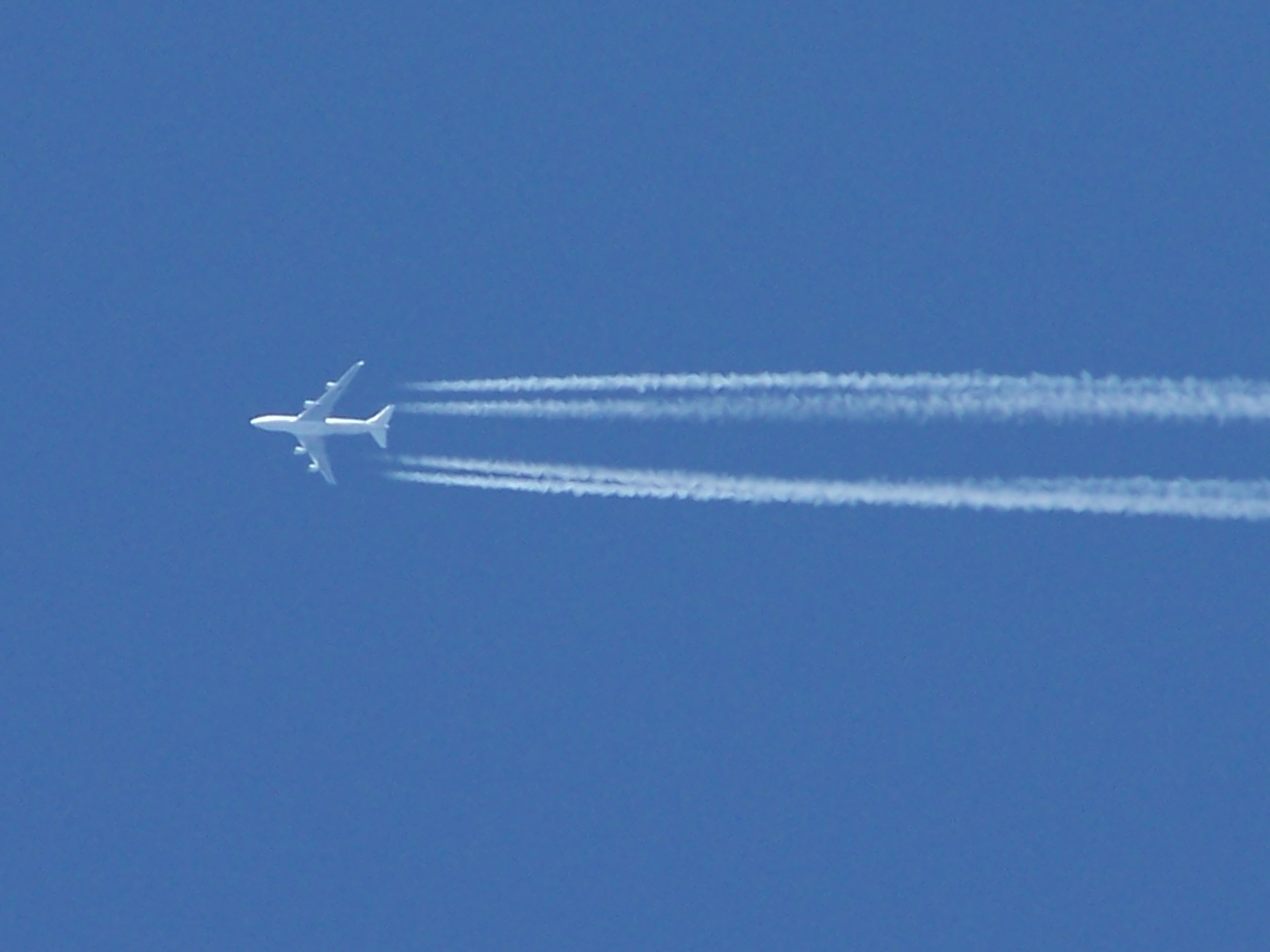 Kondensstreifen einer viermotorigen Düsenmaschine